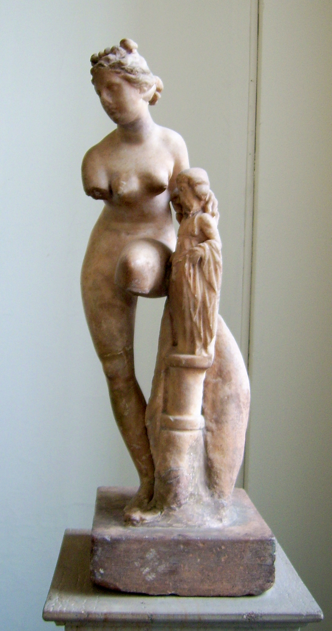 Sandalenlösende Aphrodite, hellenistische Statue aus Marmor, Ende des 2. Jahrhunderts v. Chr., gefunden in Aigion, 1884 aus der Sammlung Sabouroff für die Antikensammlung Berlin erworben, Höhe 64 cm, Sk 23